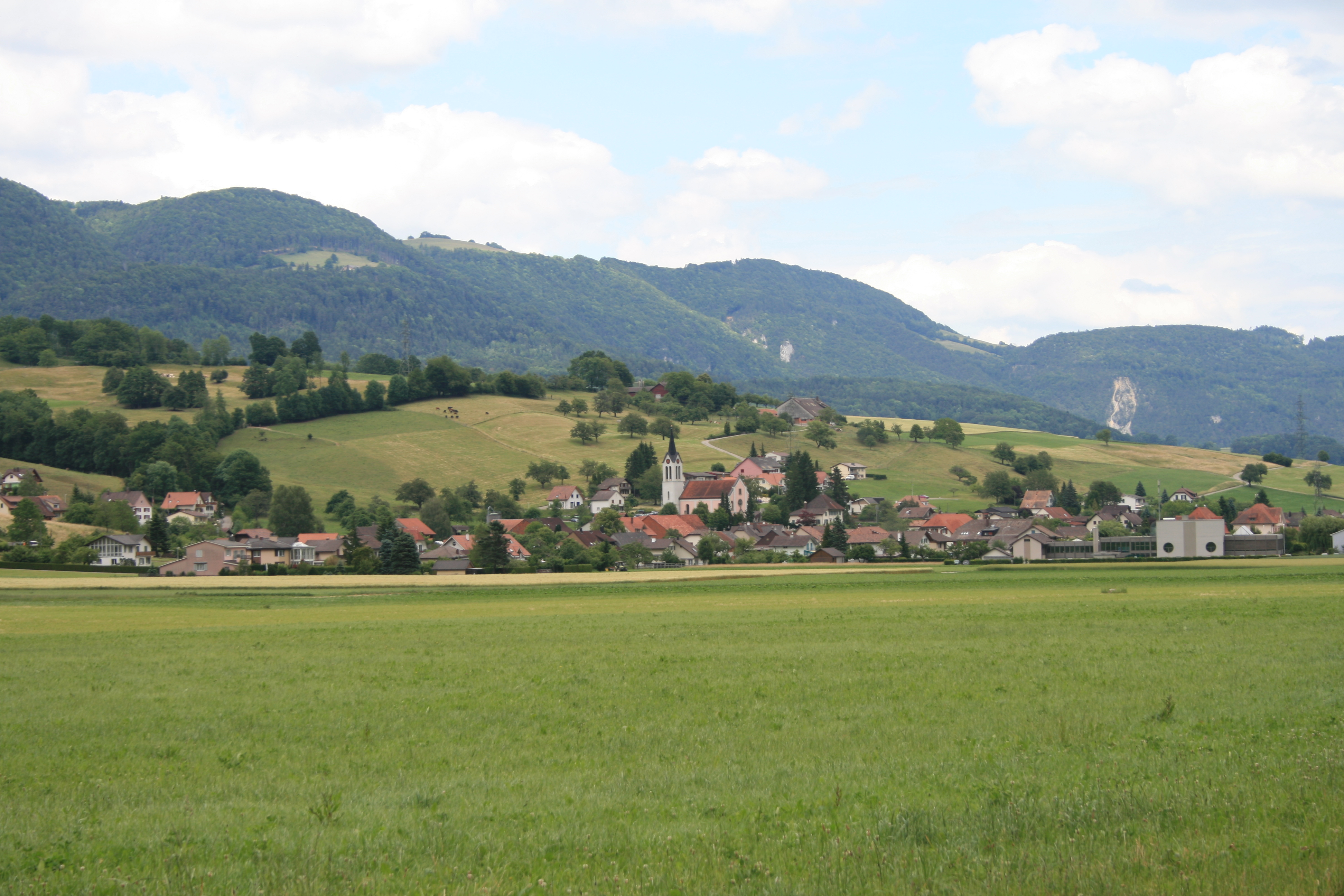 Herbetswil SO, Schweiz